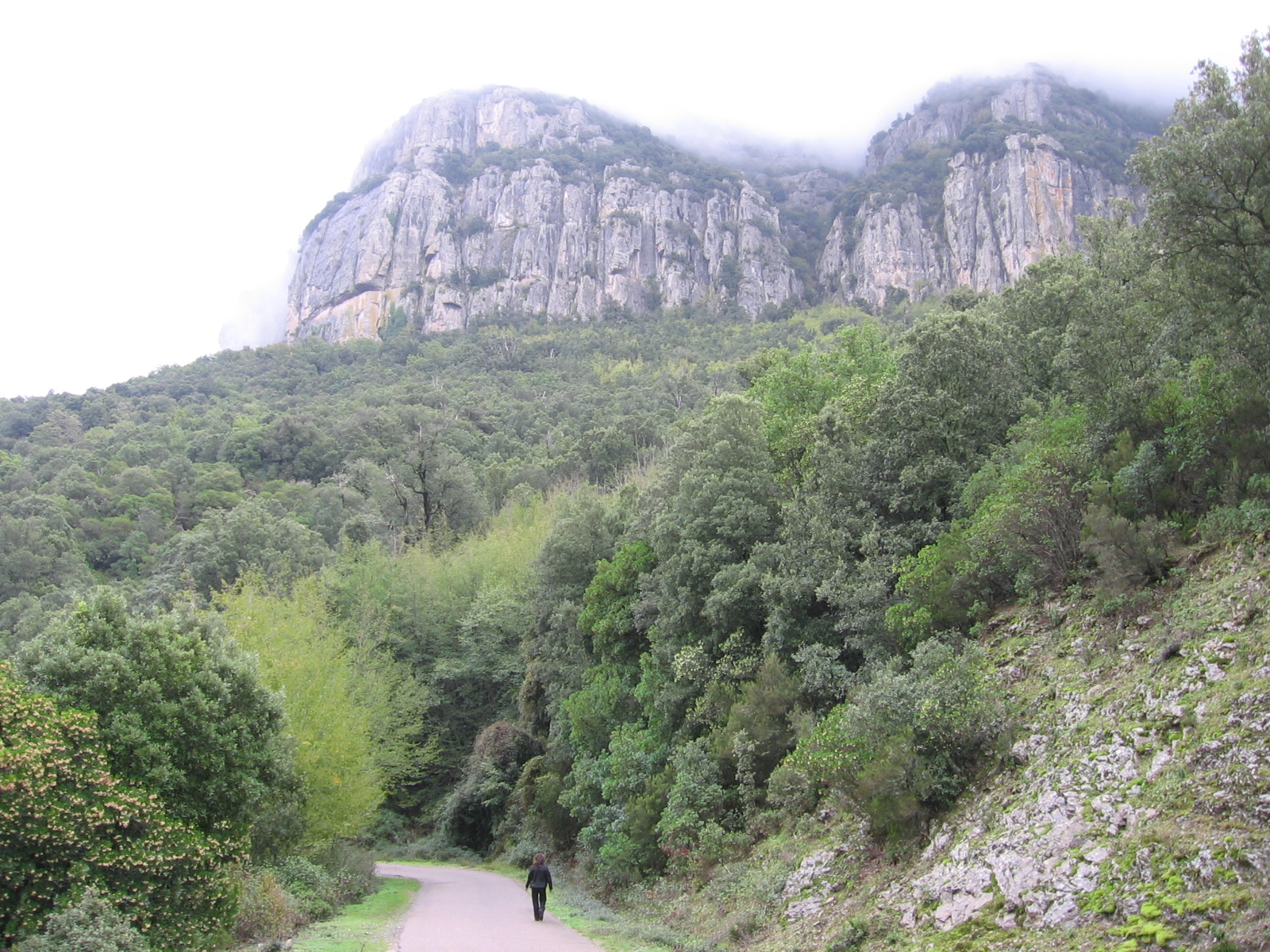 Boschi intorno a Seui (provincia dell'Ogliastra). Foto di Renato Lai